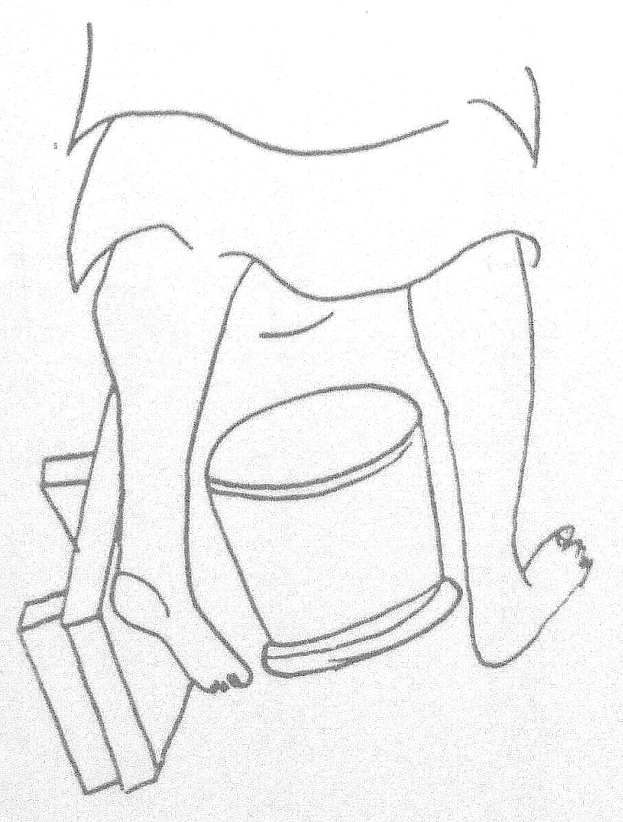 小笛事件における矢野鑑定書付図